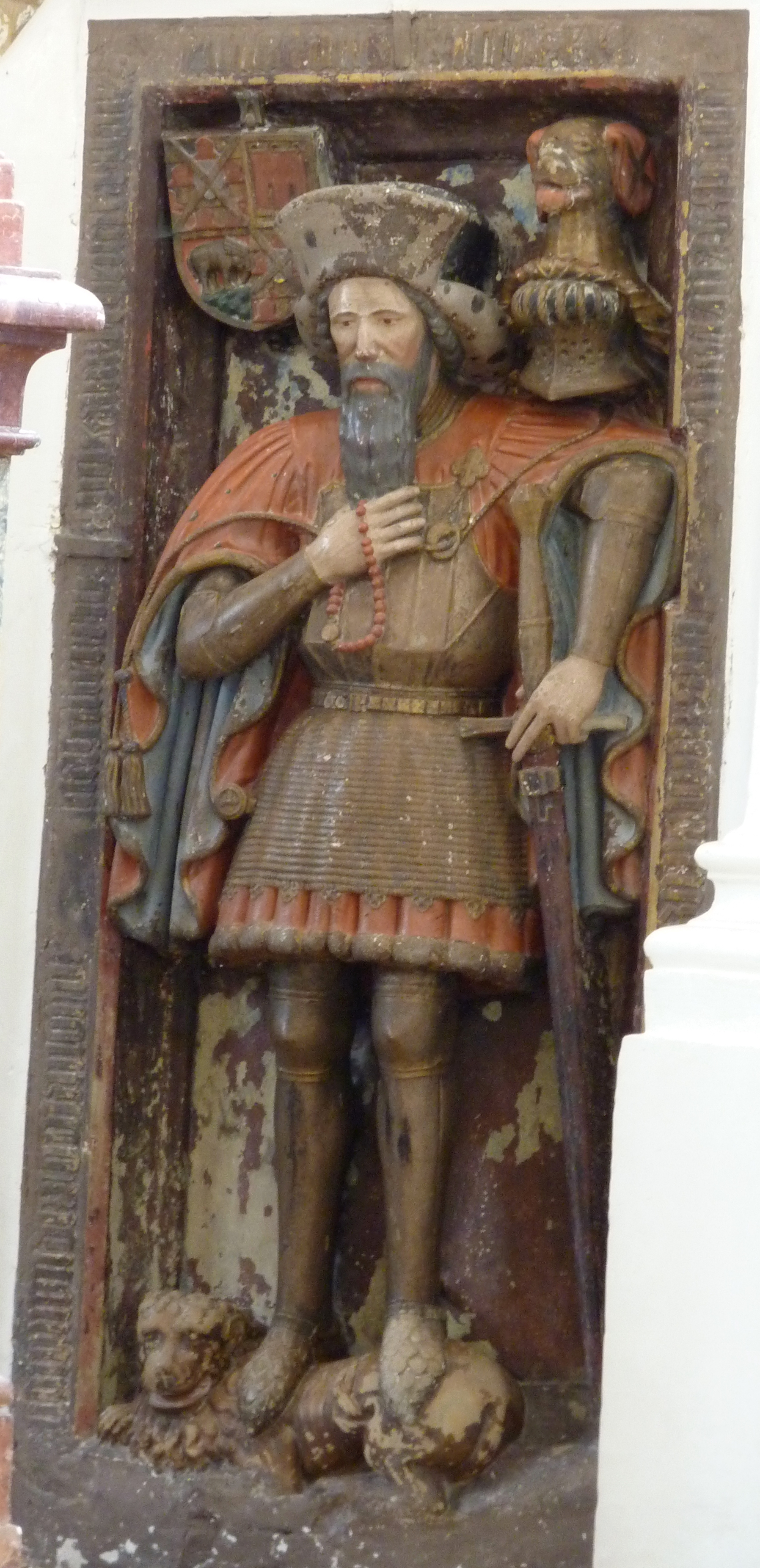 Katholische Pfarrkirche Mariä Himmelfahrt, ehemalige Kirche des Zisterzienserinnenklosters in Kirchheim am Ries im Ostalbkreis (Baden-Württemberg), Epitaph von Ludwig XI. von Oettingen (im Barte) († 1440), Hofmeister unter Kaiser Sigismund